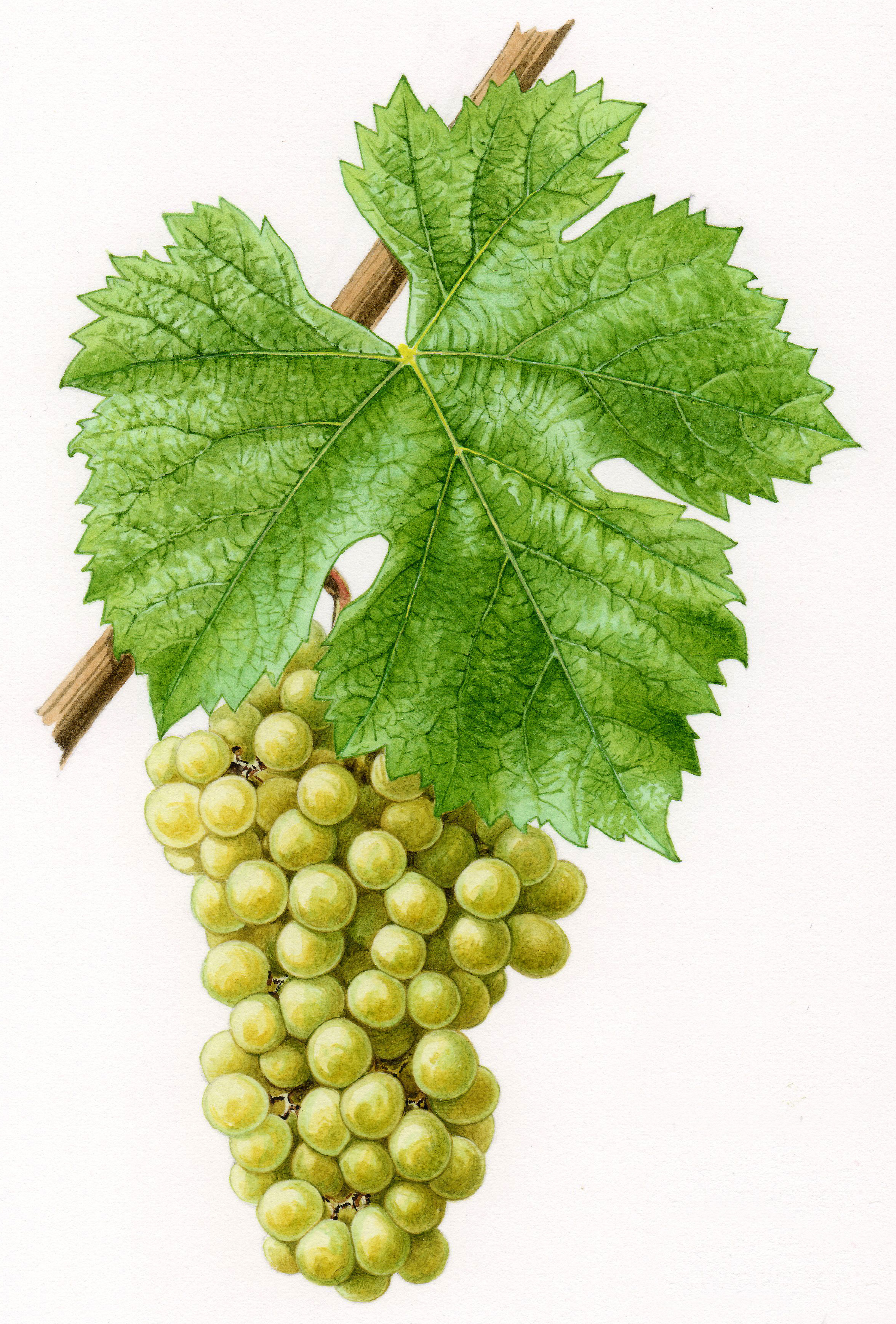 Aquarelle originale pour les Cépages de France (2001)